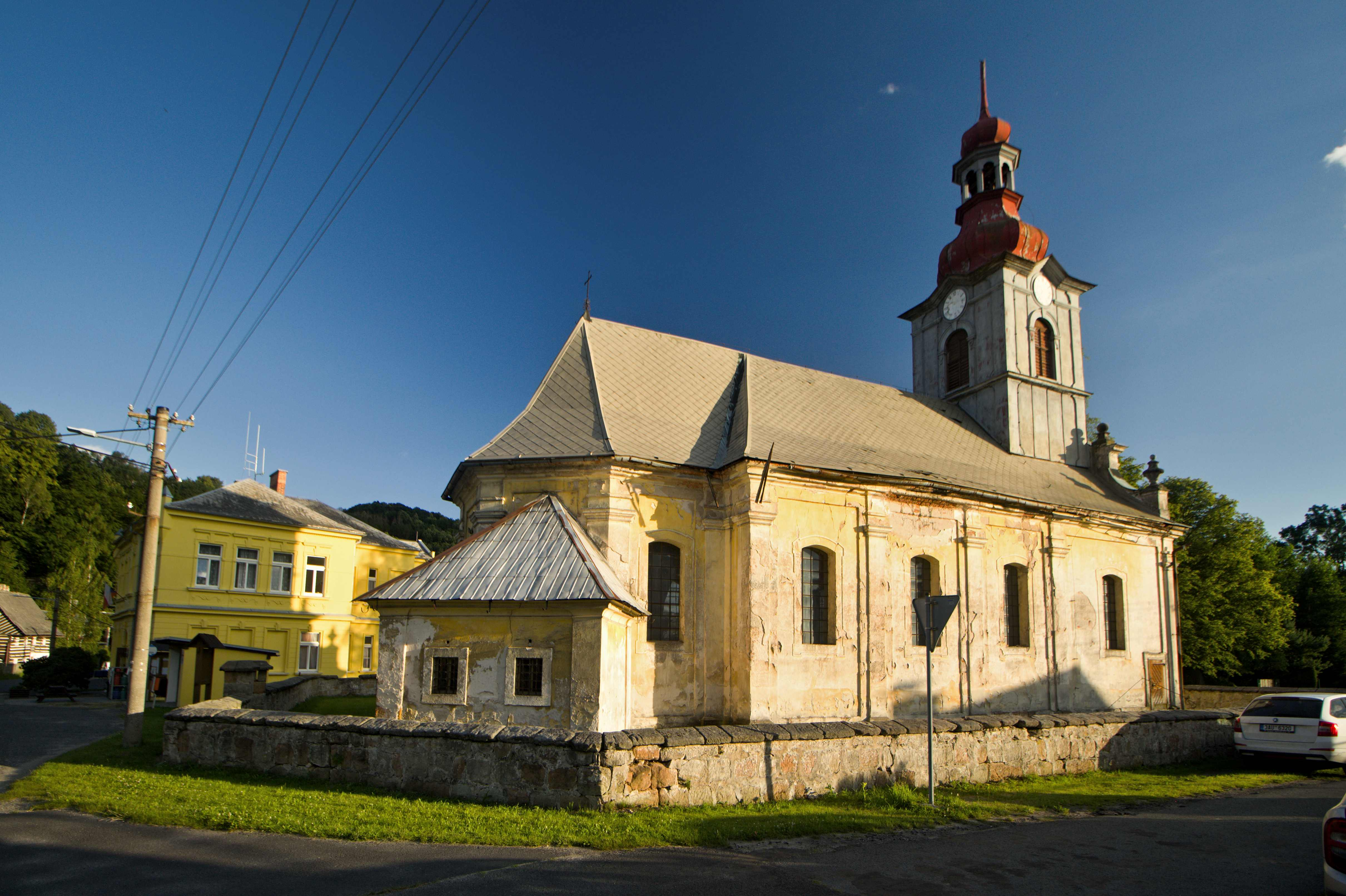 Velenice, kostel Nejsvětější Trojice